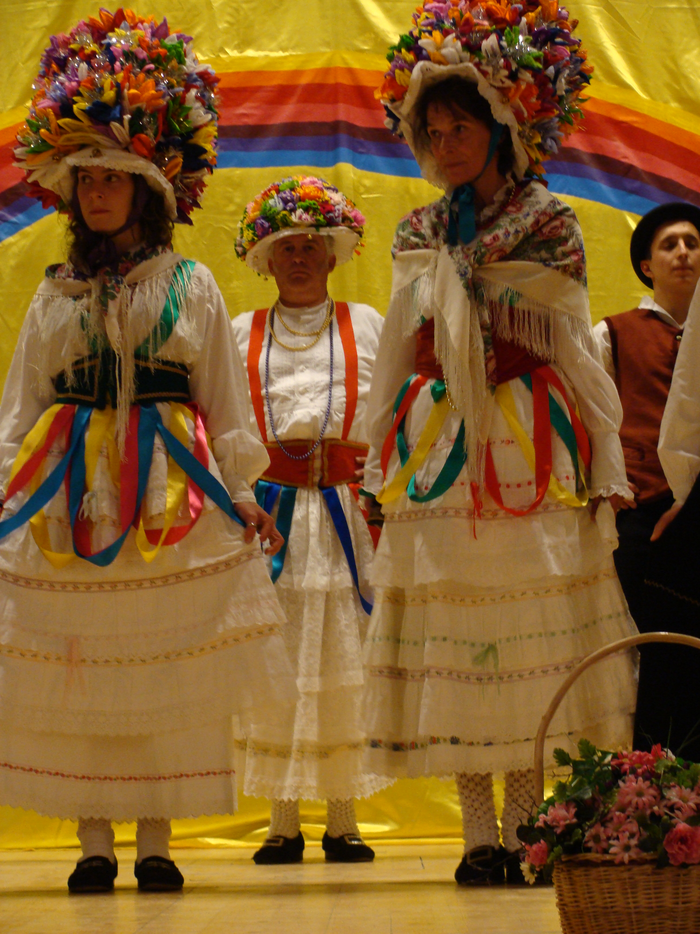 Costumes folkloriques de Resia (Frioul - Vénétie Julienne).